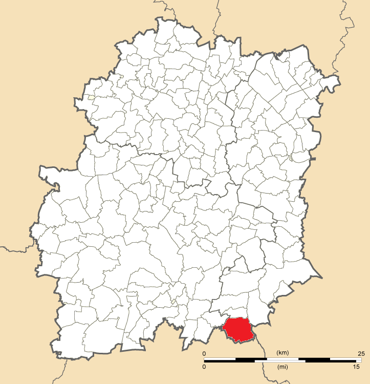 Carte de position de Boigneville en Essonne (91)